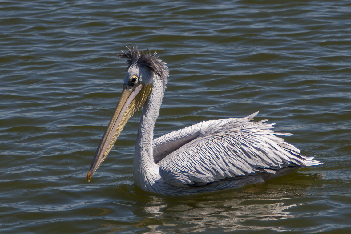 Pink-backed Pelican - Naivasha - Kenya_50276